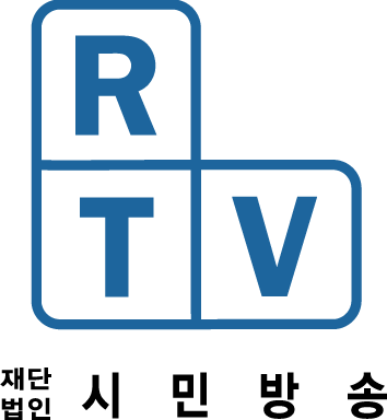 시민방송 RTV의 로고